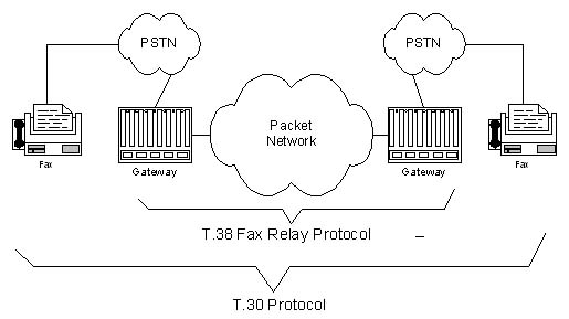 GFDL-self, jpeg format